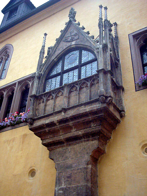 Regensburg (Bayern): Der Erker des Reichstagssaals Bildautor: Peter Bubenik - Aufnahmedatum: 02.07.2004 Mehr Bilder aus Regensburg: Sitzung des Immerwährenden Reichstags in Regensburg im Jahr 1640 Ein Abend an der Donau bei der Steinernen Brücke... Als in Regensburg noch Straßenbahnen fuhren - Modell des Arnulfsplatzes um ca. 1960 Meditieren auf Rengschburgerisch: Der Spitalgarten in Stadtamhof an der Steinernen Brücke Das Wohnhaus des Astronomen Johannes Kepler und seiner Familie von 1626-1628 Der Goldene Turm Denkmal des Don Juan d'Austria, Sieger in der Seeschlacht von Lepanto Die Neugestaltung des Neupfarrplatzes Mitte der 90er-Jahre fand nicht nur ungeteilte Zustimmung... Der Brückturm neben dem Salzstadel (2) Die historische Wurstküche ("Wurstkuchl") am Marc-Aurel-Ufer Dom St. Peter (2) Die Porta Praetoria (2) Das Ostentor Das "Bruckmandl" (Brückenmännlein) in der Mitte der Steinernen Brücke Zeugl (bair. für "Aushängeschild") des historischen Lokals "Zum Walfisch" Regensburg (Bayern): Der Biergarten im Bischofshof neben dem Dom (2) Gedenktafel für Oskar Schindler, der nach dem Krieg in Regensburg wohnte